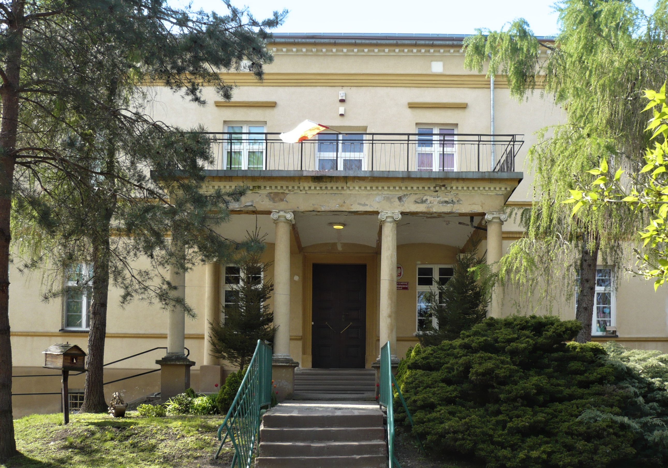 Dwór w Bierkowicach